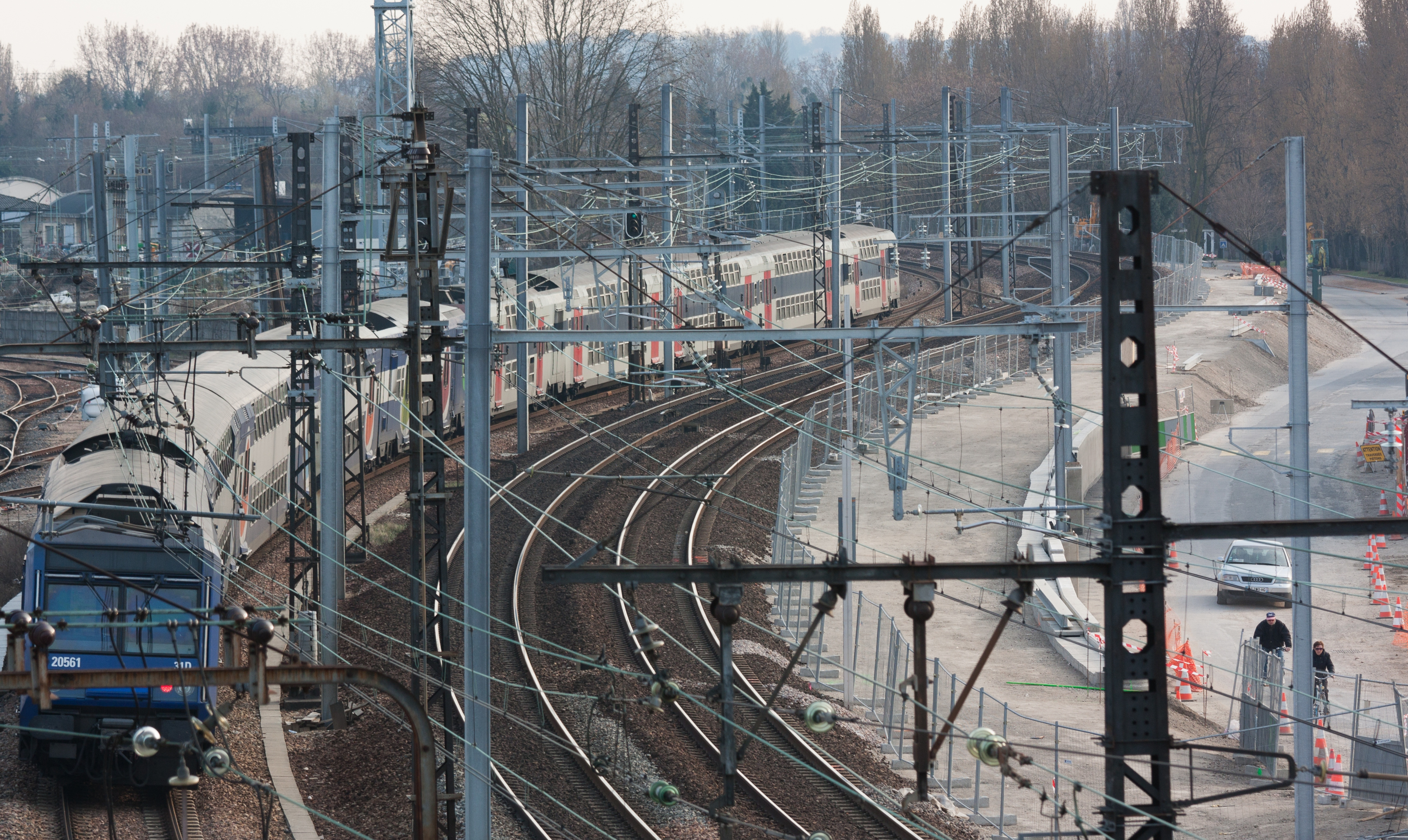 Travaux de construction de la gare de Créteil-Pompadour en mars 2012, ligne D du RER, Val-de-Marne, France